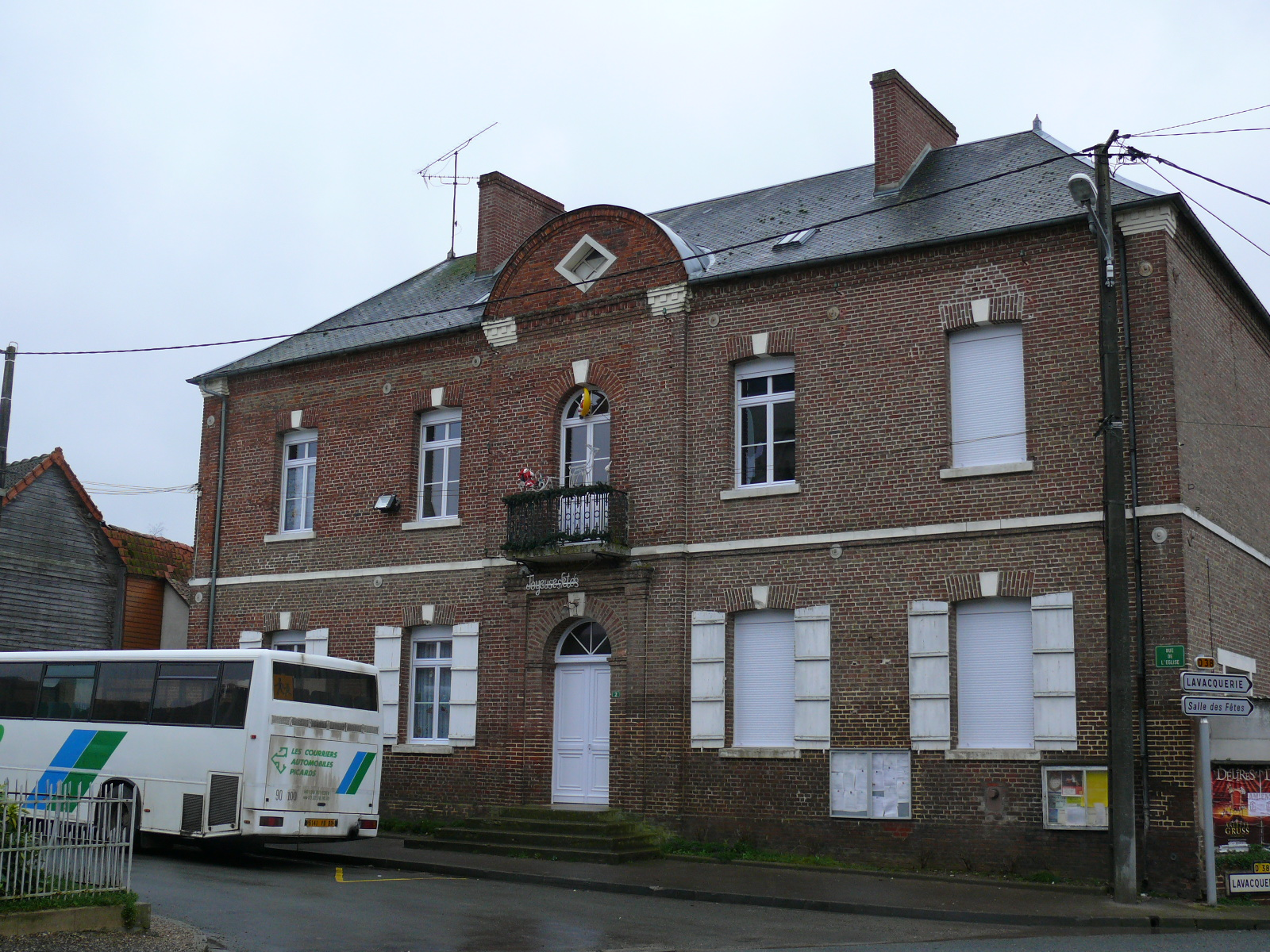 CROISSY-SUR-CELLE : La Mairie-école